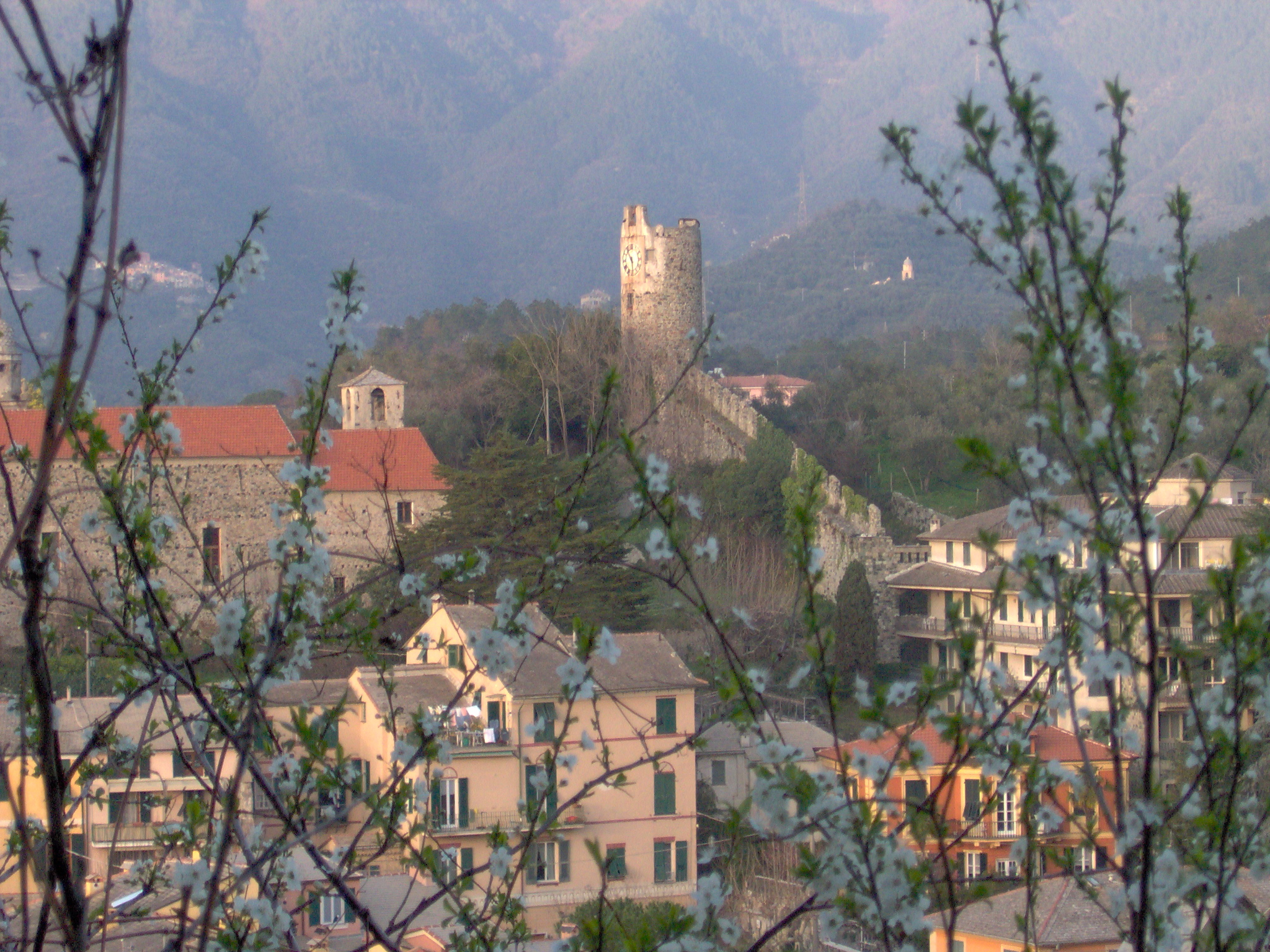 Scorcio delle mura di Levanto / Town walls of Levanto (La Spezia, Liguria, Italy)